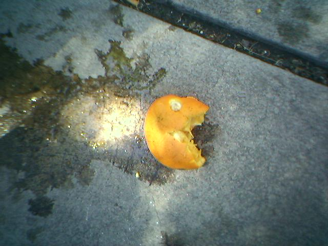 citricidio